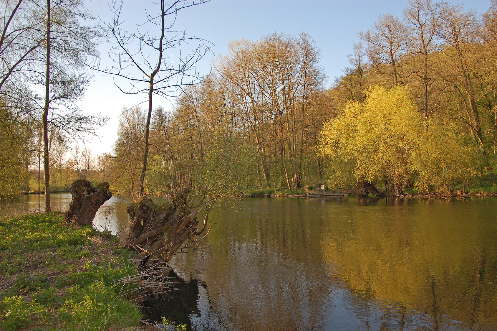 Enz-Blick vom Wörth (Werder) entlang des ehemaligen Remminger Wehrs auf den Einlass zum Flößerkanal zur Untermberger Sägmühle